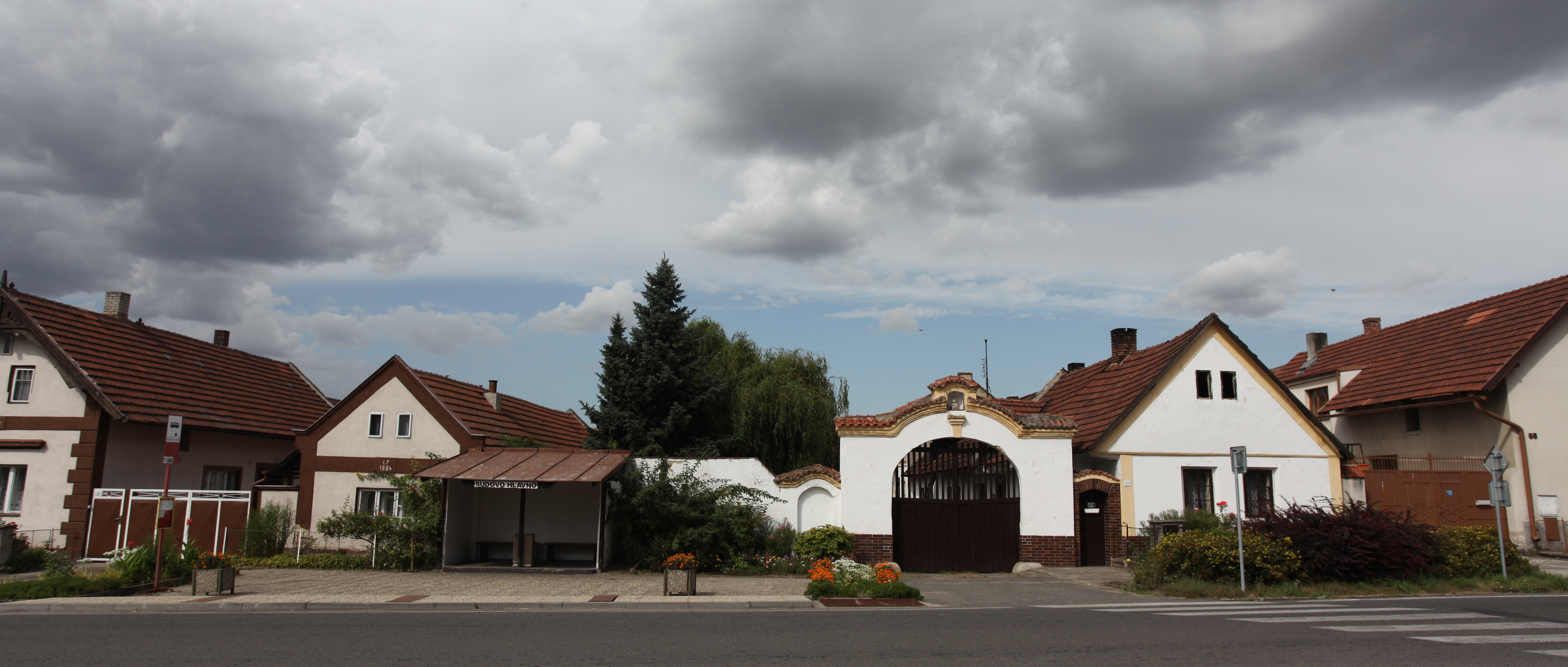 Česky: Sudovo Hlavno, zastávka a statek na návsi